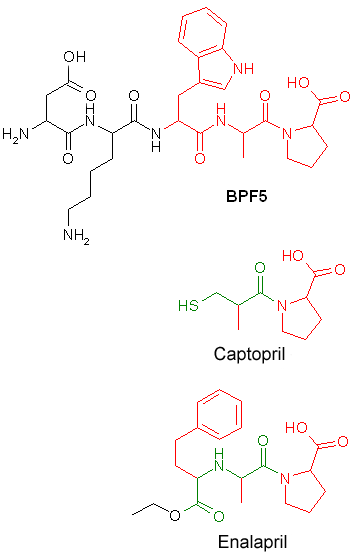 Strukturanalogie von ACE-Hemmern mit BPP5a. (Wieder hergestellte Version)